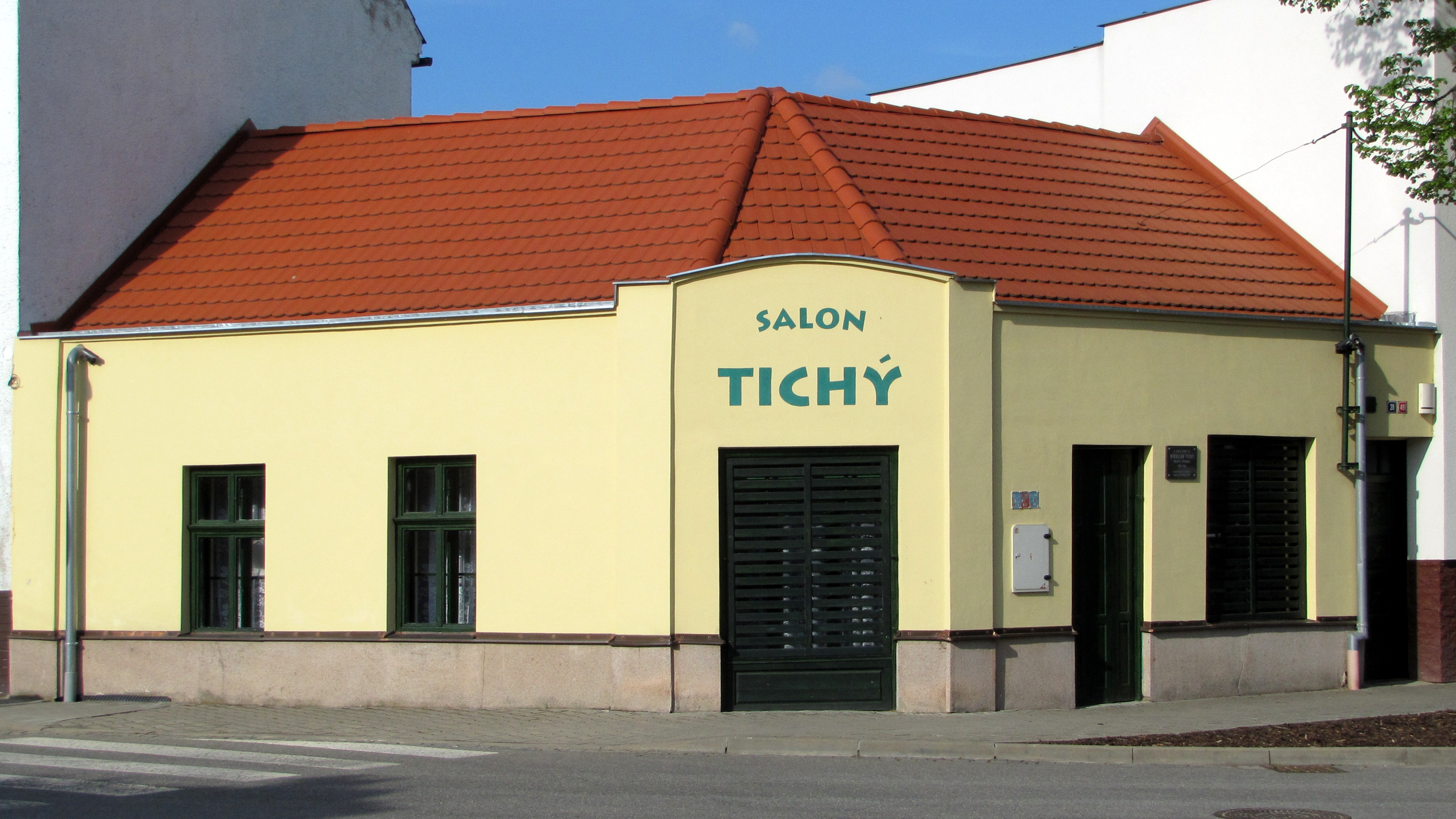 Dům malíře a fotografa Miroslava Tichého v Kyjově